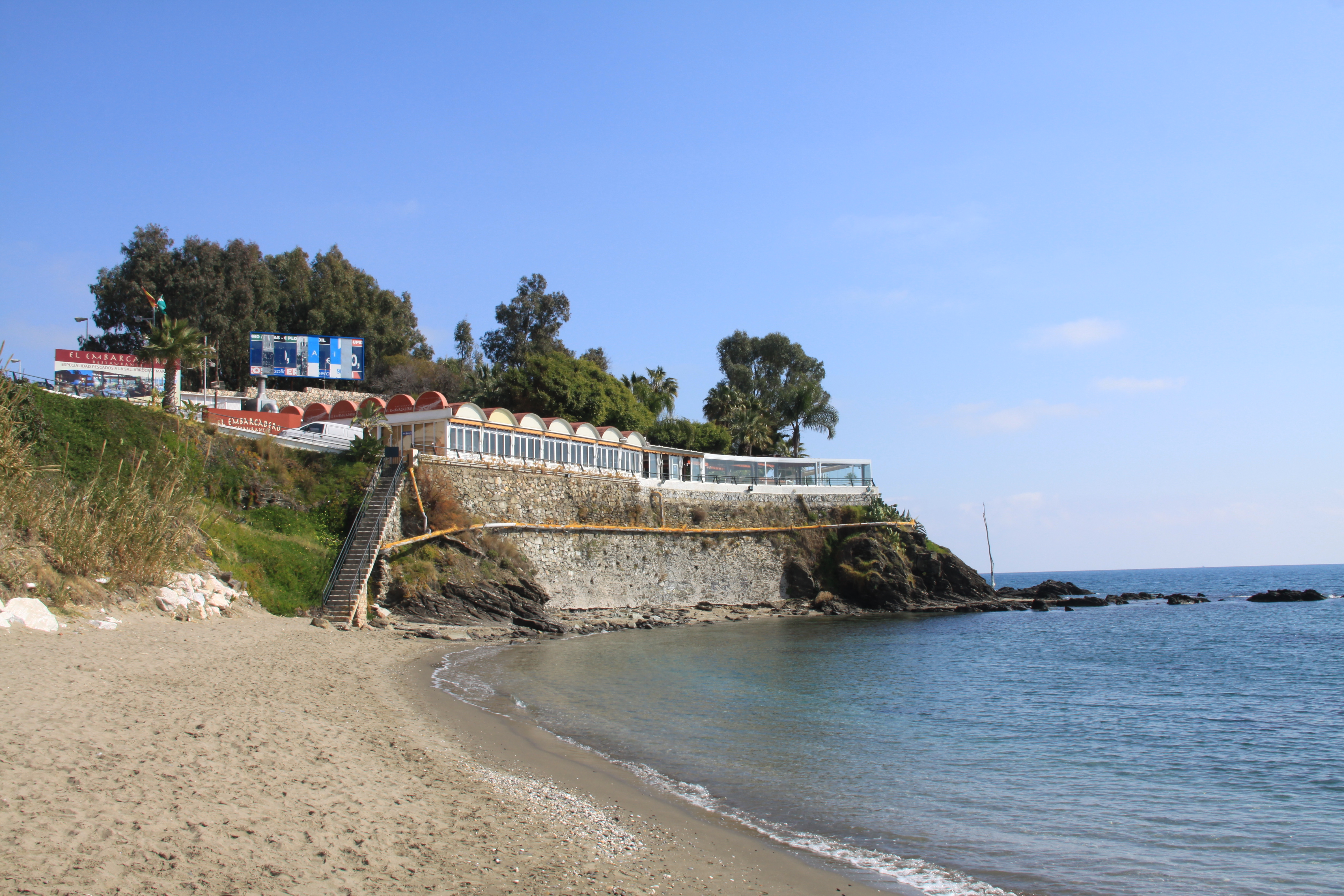 Restaurante El Embarcadero and playa de Arroyo Hondo, Benalmádena.